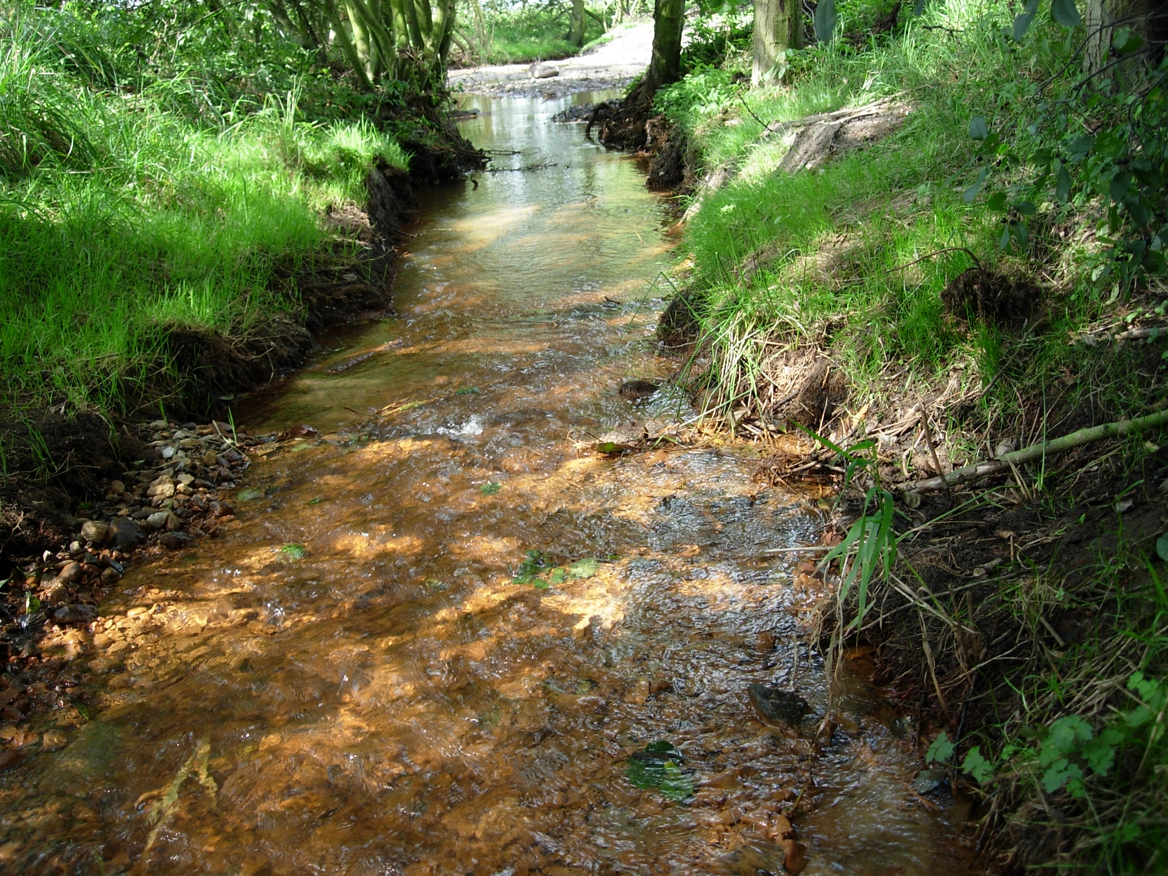 Blick von der Brücke des Feldweg 65 auf die Wedeler Au (Mittellauf)